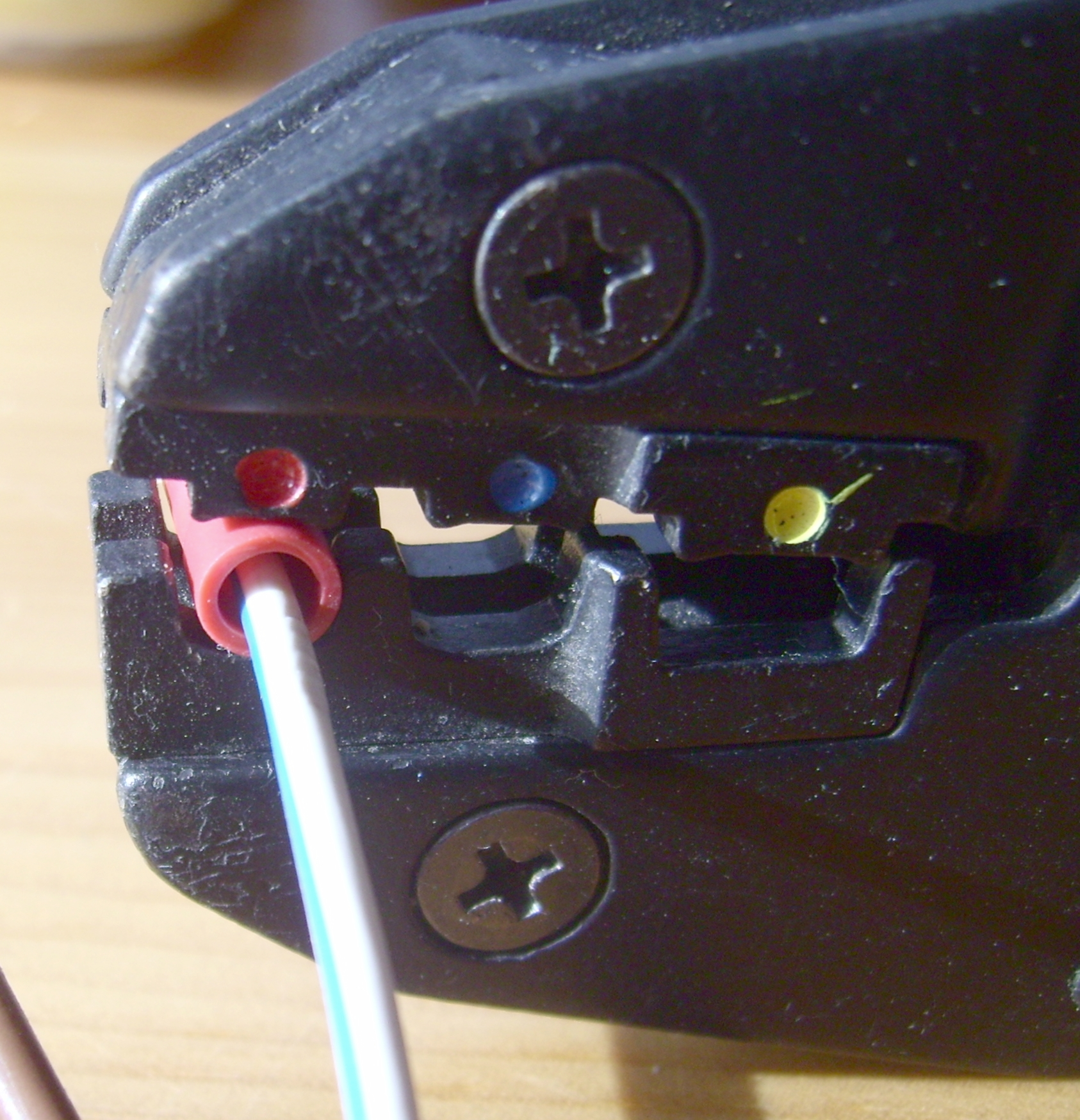 Detailfoto einer Crimpzange mit eingelegtem isolierten Kabelschuh (Farbkennungen rot) während des Crimpvorgangs